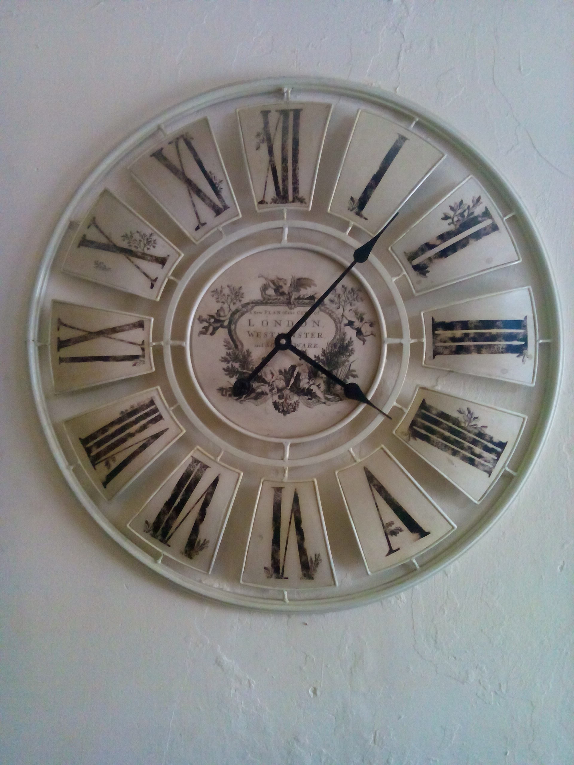 ساعة حائط كبيرة كتبت عليها الارقام باحرف لاتينية